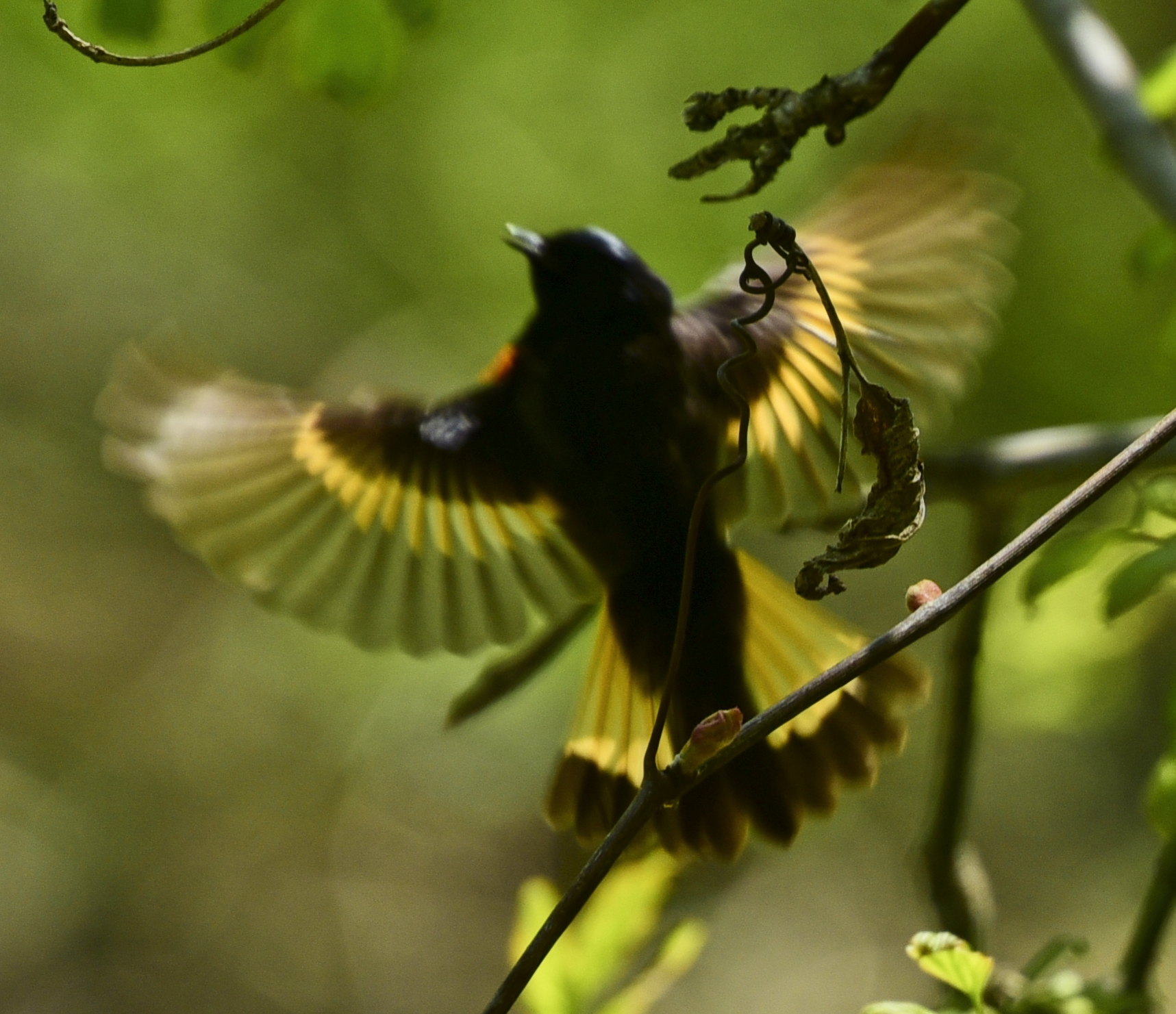 Самець пісняра горихвісткового (Setophaga ruticilla) в польоті у парку Джеймс Ґарденс у Торонто